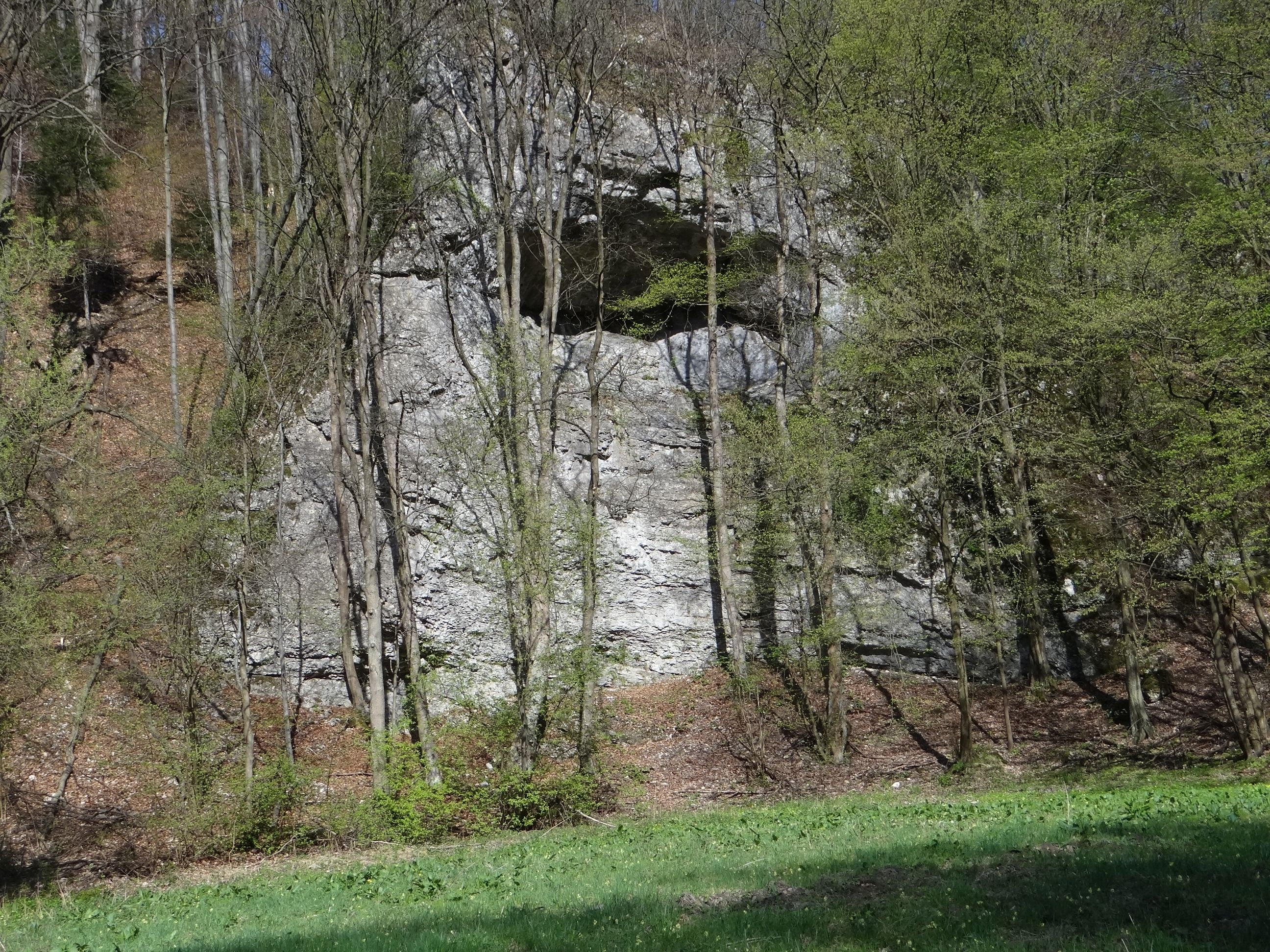 Skała Muszla w grupie skał Framugi w Dolinie Sąspowskiej